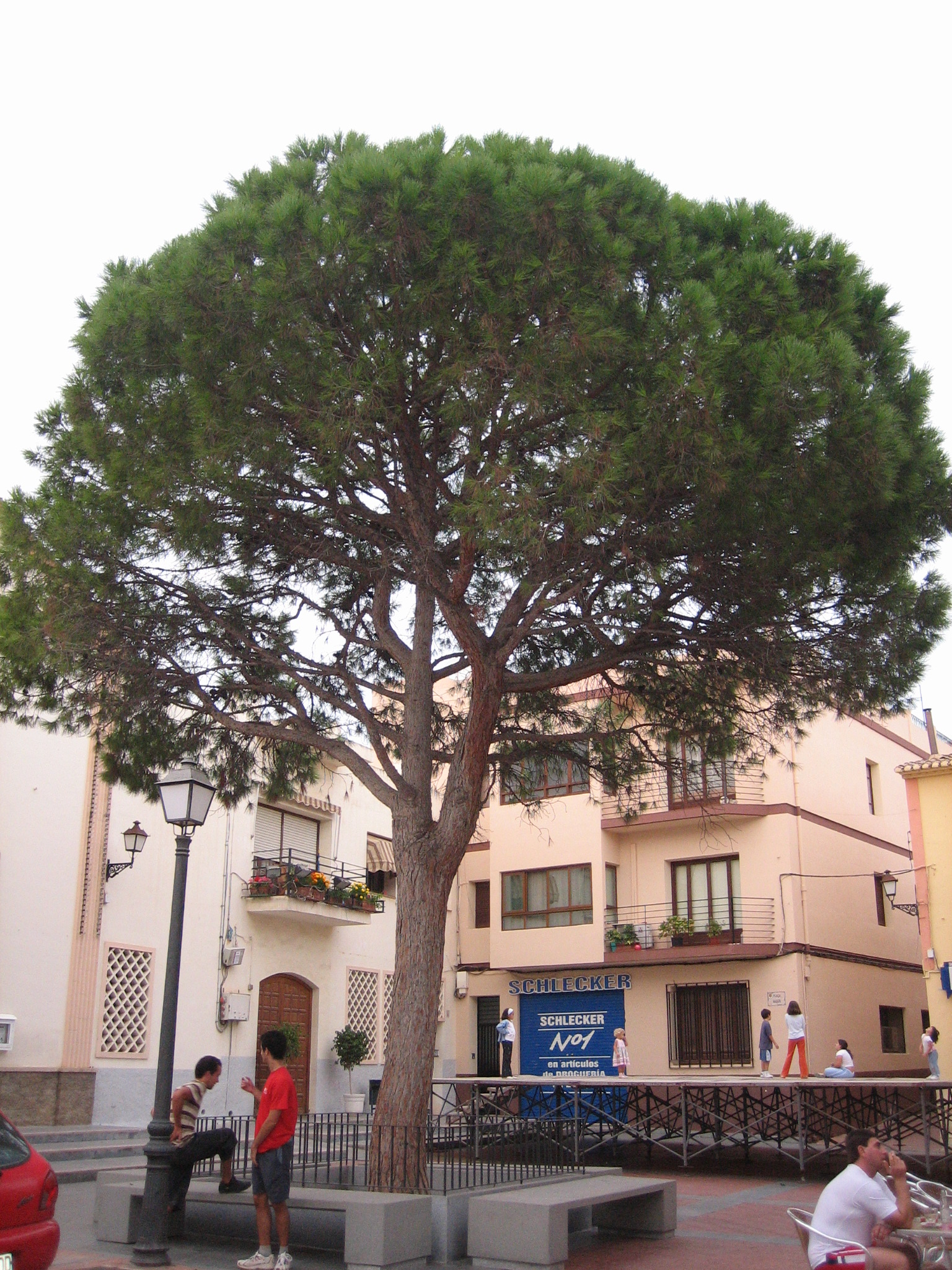 El pino de Alfaz del Pi, en la Plaza Mayor Vista de la plaza mayor de Alfaz del Pi (Alicante, España). El pino plantado en esta plaza es al que le debe el nombre el municipio. Autor: Rodriguillo Fecha: 09/10/2006